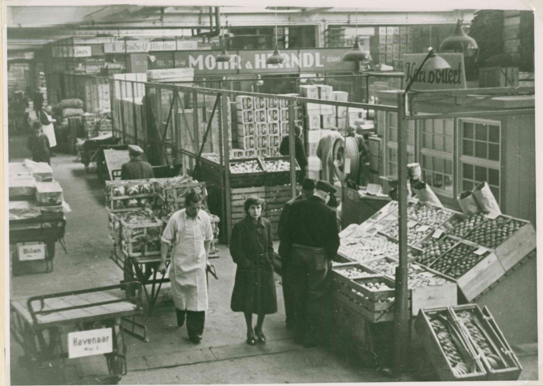 Das Innere des Fruchthof Berlin 1951